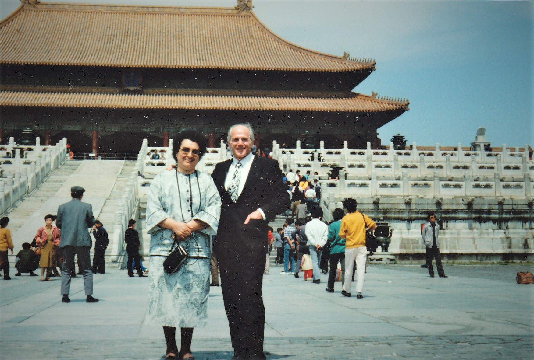 Hofmann, Ulrich mit Ehefrau in China (VR China, Peking, 1989)